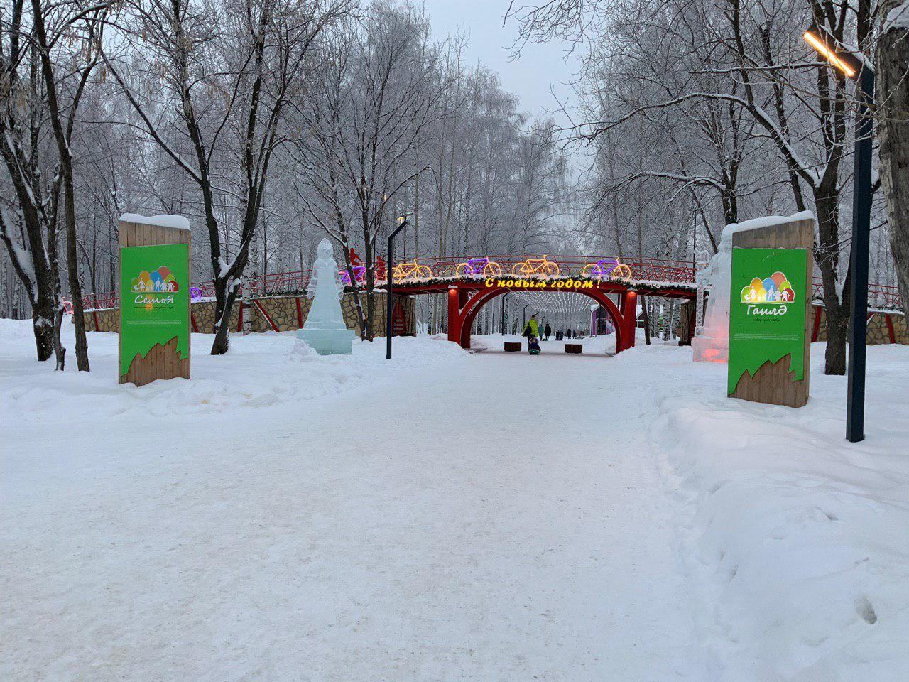 Татарча/tatarça: Вход в нижнекамский парк "Семья"